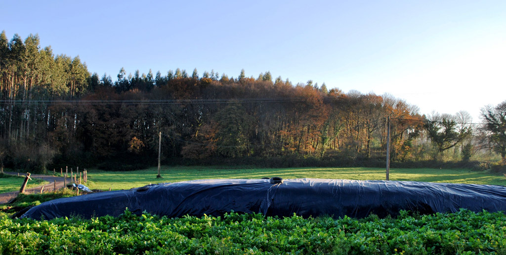 Vista do castro de Vilarullo